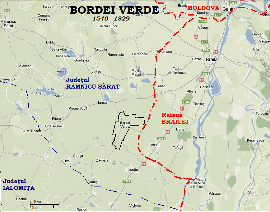 Fişierul este o hartă de rezoluţie mciă realizată de mine